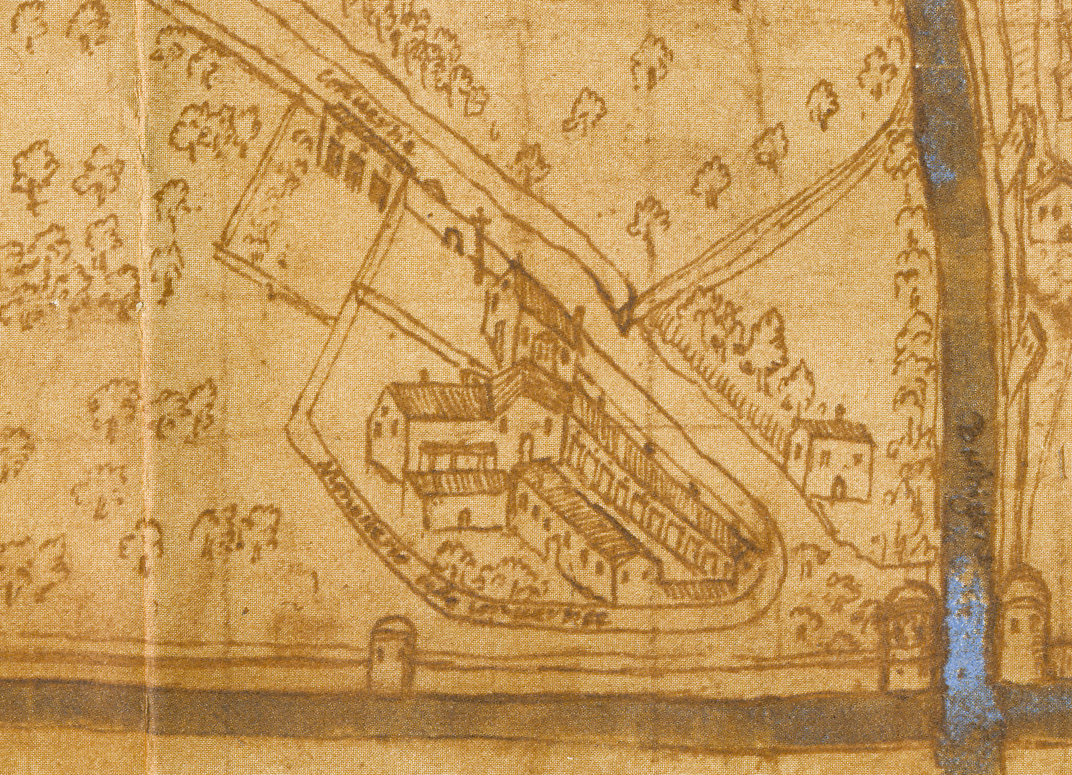 Vicenza - Pianta Angelica 1580 - particolare del Borgo Pusterla - Monastero delle Convertite